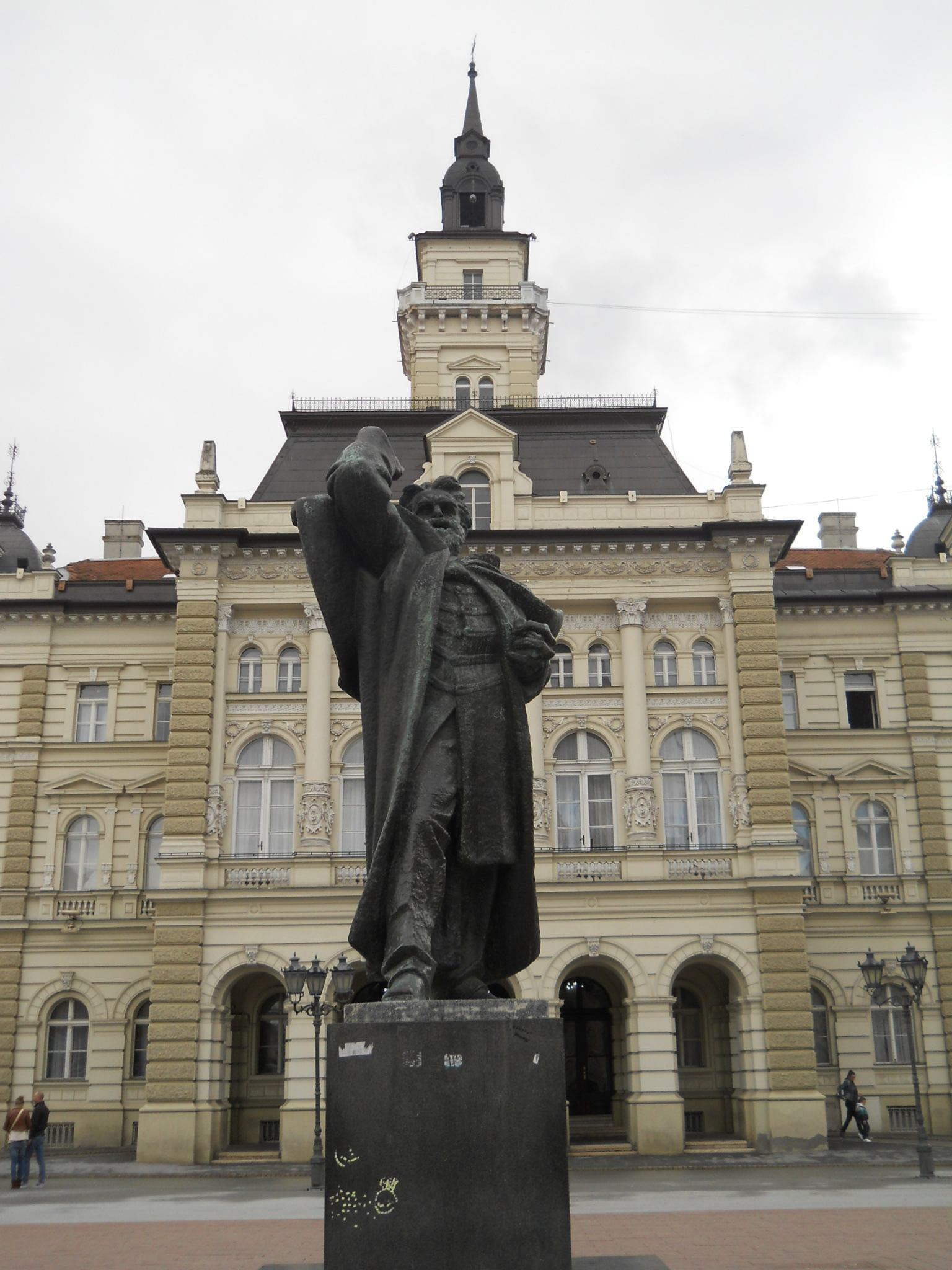 Újvidék - Svetozar Miletić szobra a Szabadság-téren